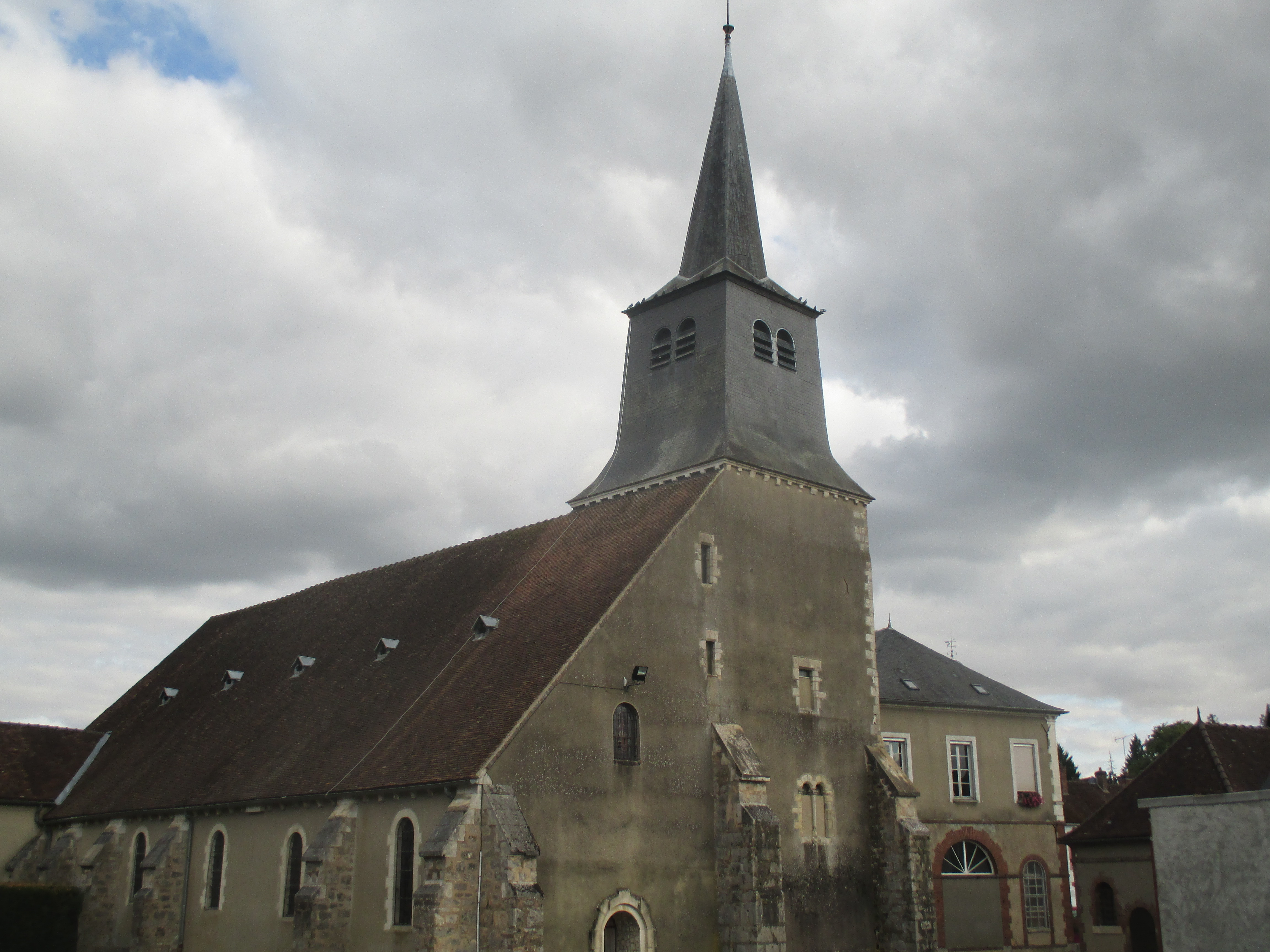 Vue de l'église de Cerisiers.